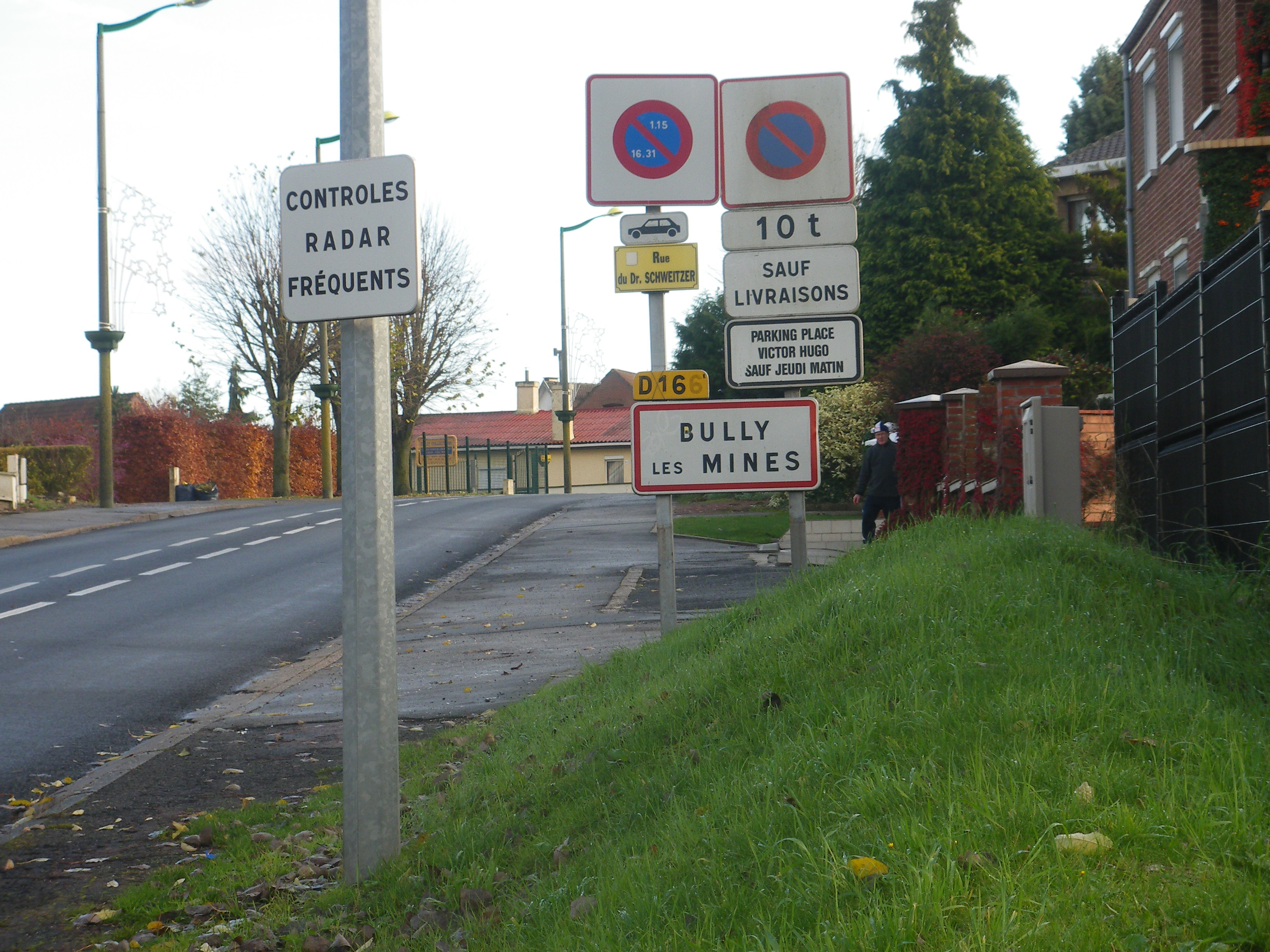 Panneau d'entrée de la commune de Bully-les-Mines.